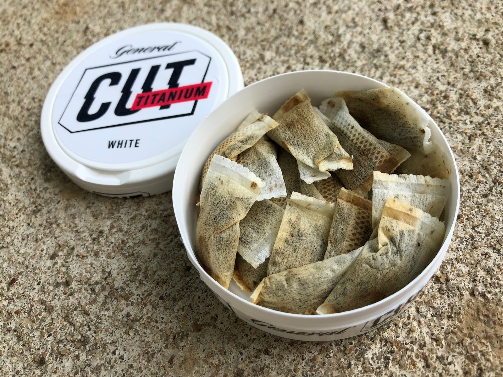 Вид скандинавского жевательного табака